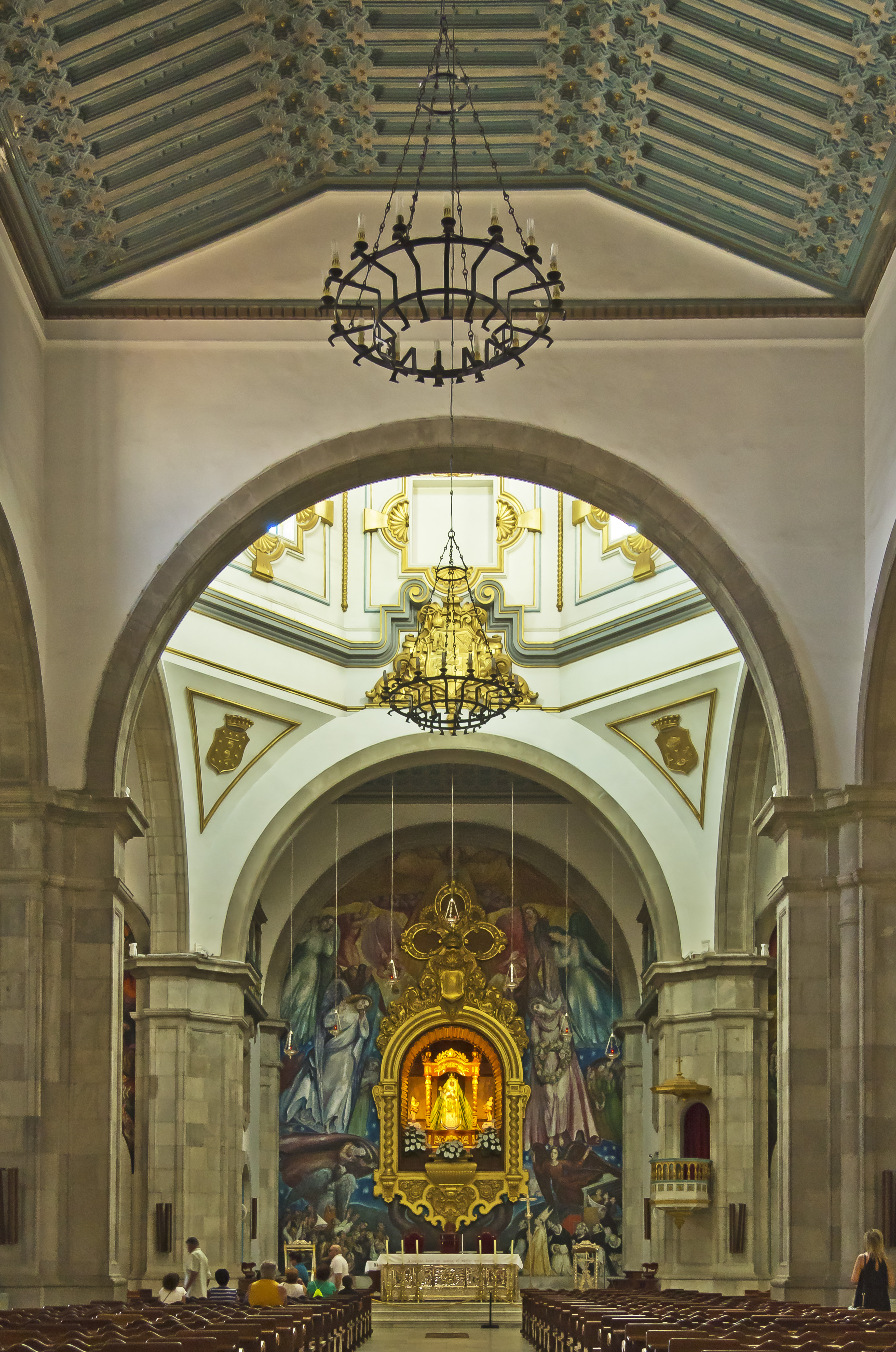 Die Basilika de Nuestra Señora de la Candelaria, Blick durch das Mittelschiff auf den Hauptaltar